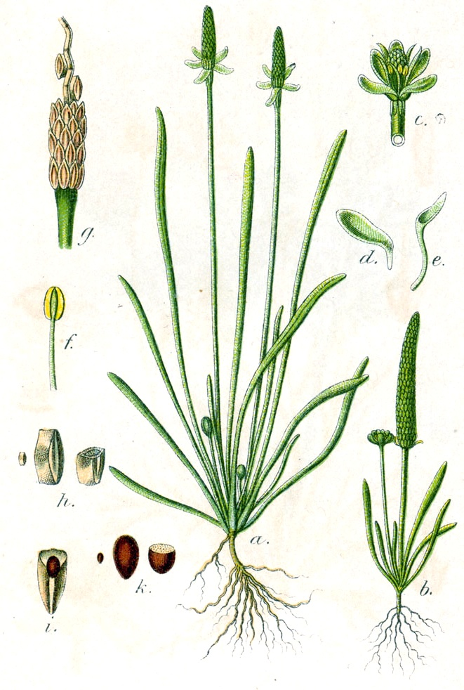 Myosurus minimus L., syn. Ranunculus minimus (L.) E.H.L.Krause, nom. ill. Original Caption Mauseschwanz, Ranunculus minimus